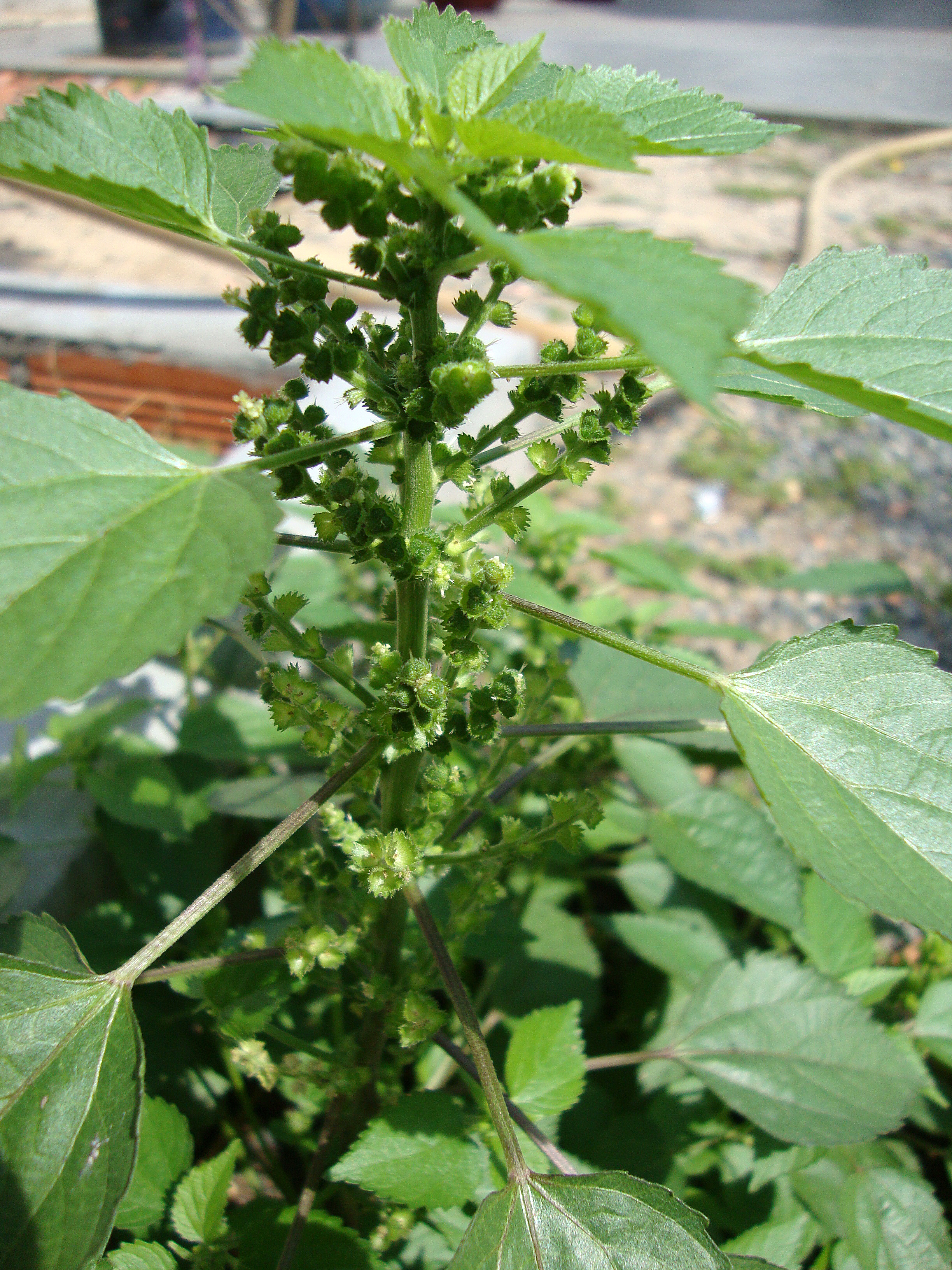 Acalypha indica L., 1753Tiếng Việt: Tai tượng Ấn Độ